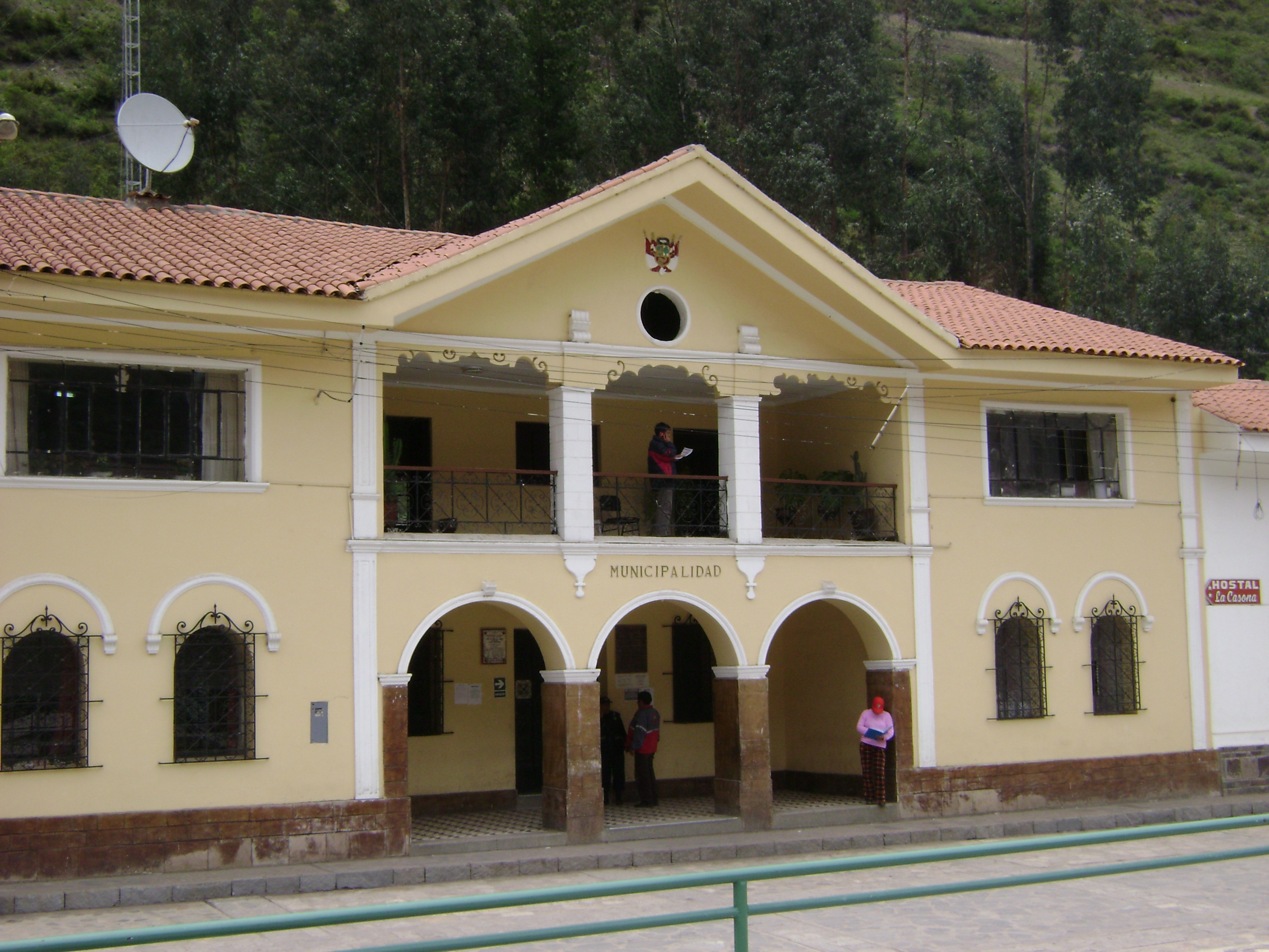 Municipalidad Provincial de Chavín de Huantar. Ancash, Perú.